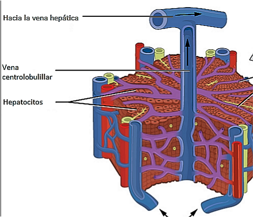 Vena centro-lobulillar